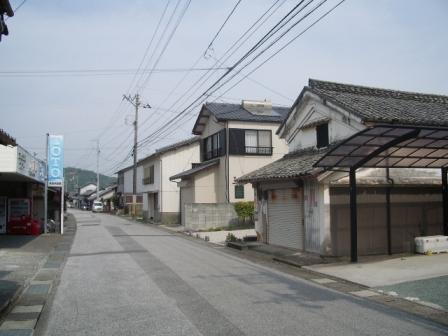 岸本の町並み